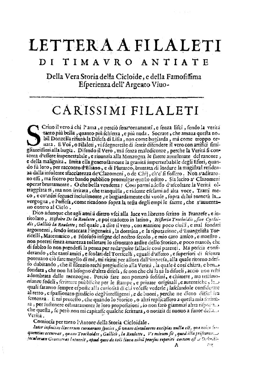 Lettera a Filaleti di Timauro Antiate della vera storia della cicloide, e della famosissima esperienza dell'argento viuo. - (In Firenze : all'insegna della Stella, 1663). - 27, [1] p. : ill. ; 4º. - Tit. dell'intitolazione del testo. - Timauro Antiate è pseudonimo di Carlo Roberto Dati (cfr. Michel & Michel, Rèp. sec.17. conservées dans France, vol. 2, p. 164) .